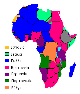 Οι αποικιακές δυνάμεις στην Αφρική το 1913 μ.Χ.